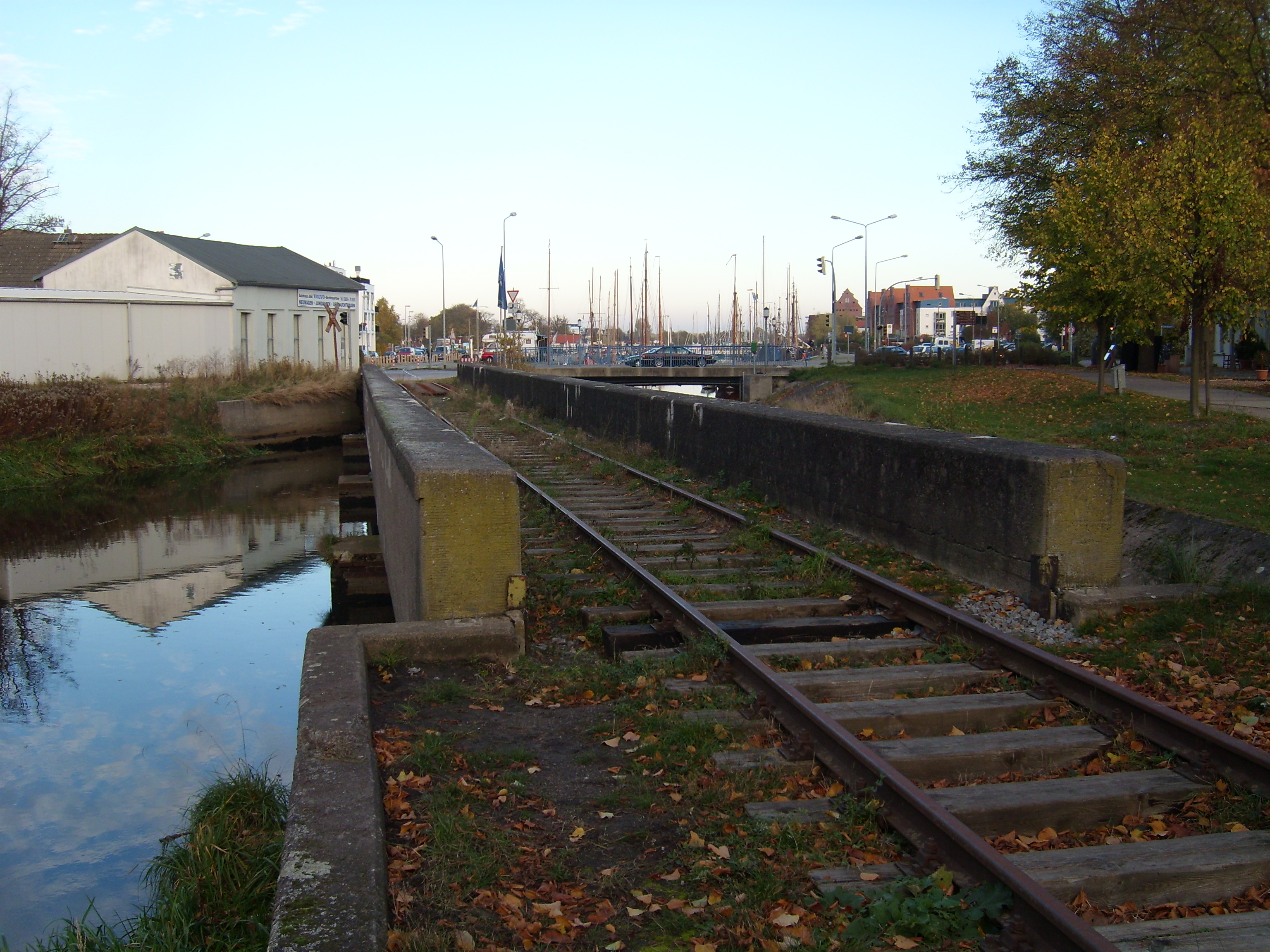 Die alte Eisenbahnbrücke über den Ryck (Greifswald). Im Hintergrund zu sehen die Steinbecker Brücke; dahinter liegt der Greifswalder Museumshafen. Die Brücke wurde im Frühjahr 2013 abgerissen.